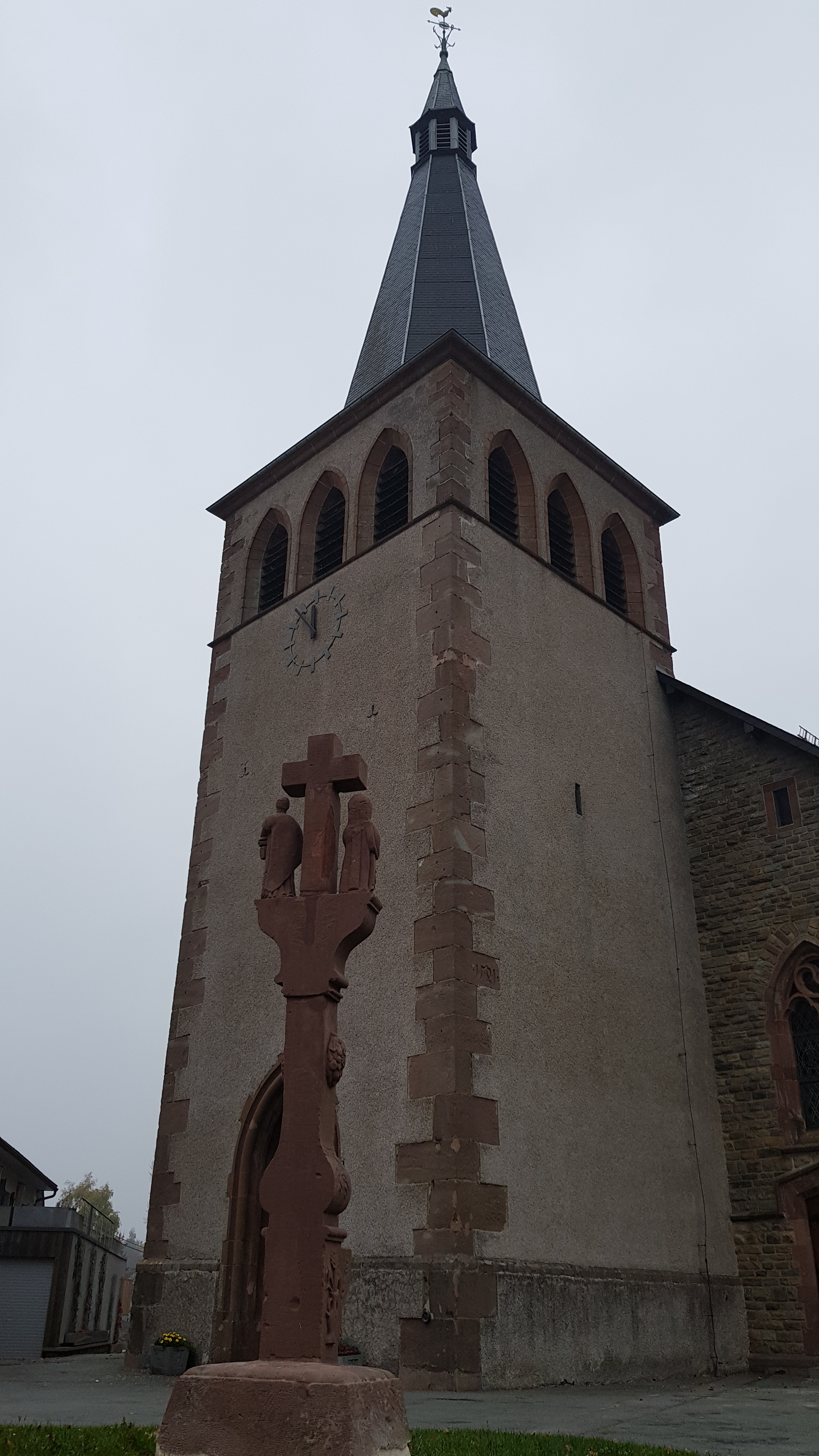 Kirche St. Hubertus, Amel, Belgien This photo of immovable heritage has been taken in the Walloon Region